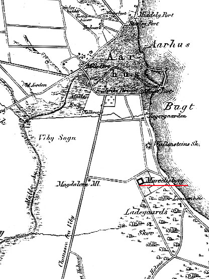 Marselisborg Herregårds beliggenhed ca. 1846